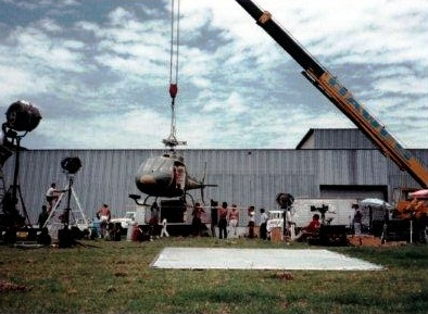 הליקופטר במצב טיסה בסרט של שלח לוחמי החופש טרום תקופת האפקטים הדיגיטאליים צילום דויד גור (1)